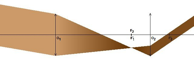 Schéma lunette astronomique : système afocal à 2 lentilles (schéma personnel) Catégorie:Schéma de physique